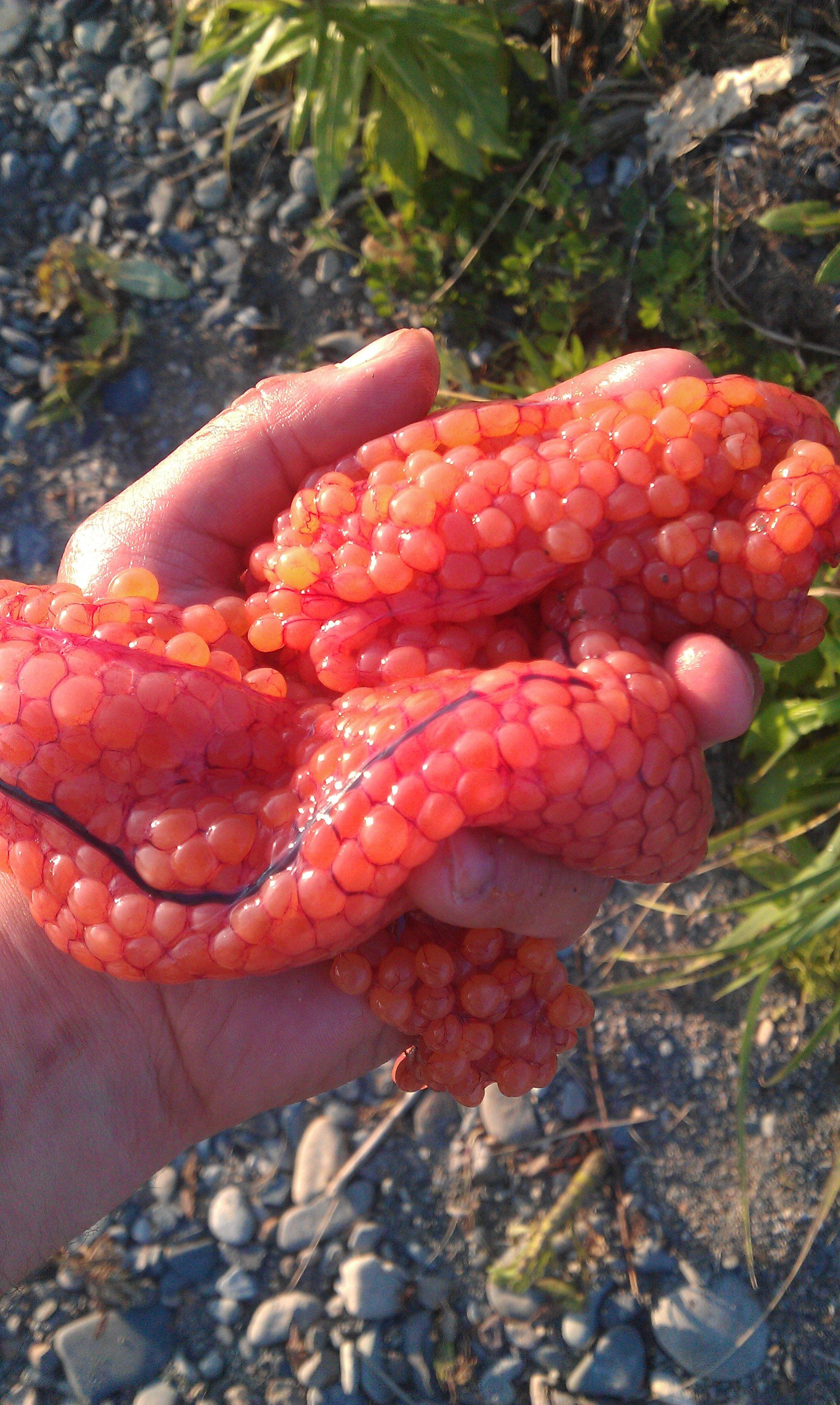 Икра кижуча. Побережье Охотского моря. Red caviar.